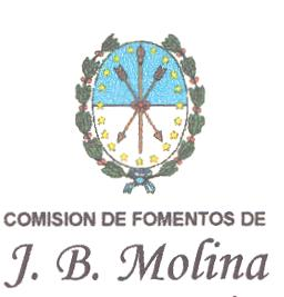 Escudo de Juan B.Molina